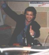 Im Radar-Studio: Andreas Türck. Bild beschnitten